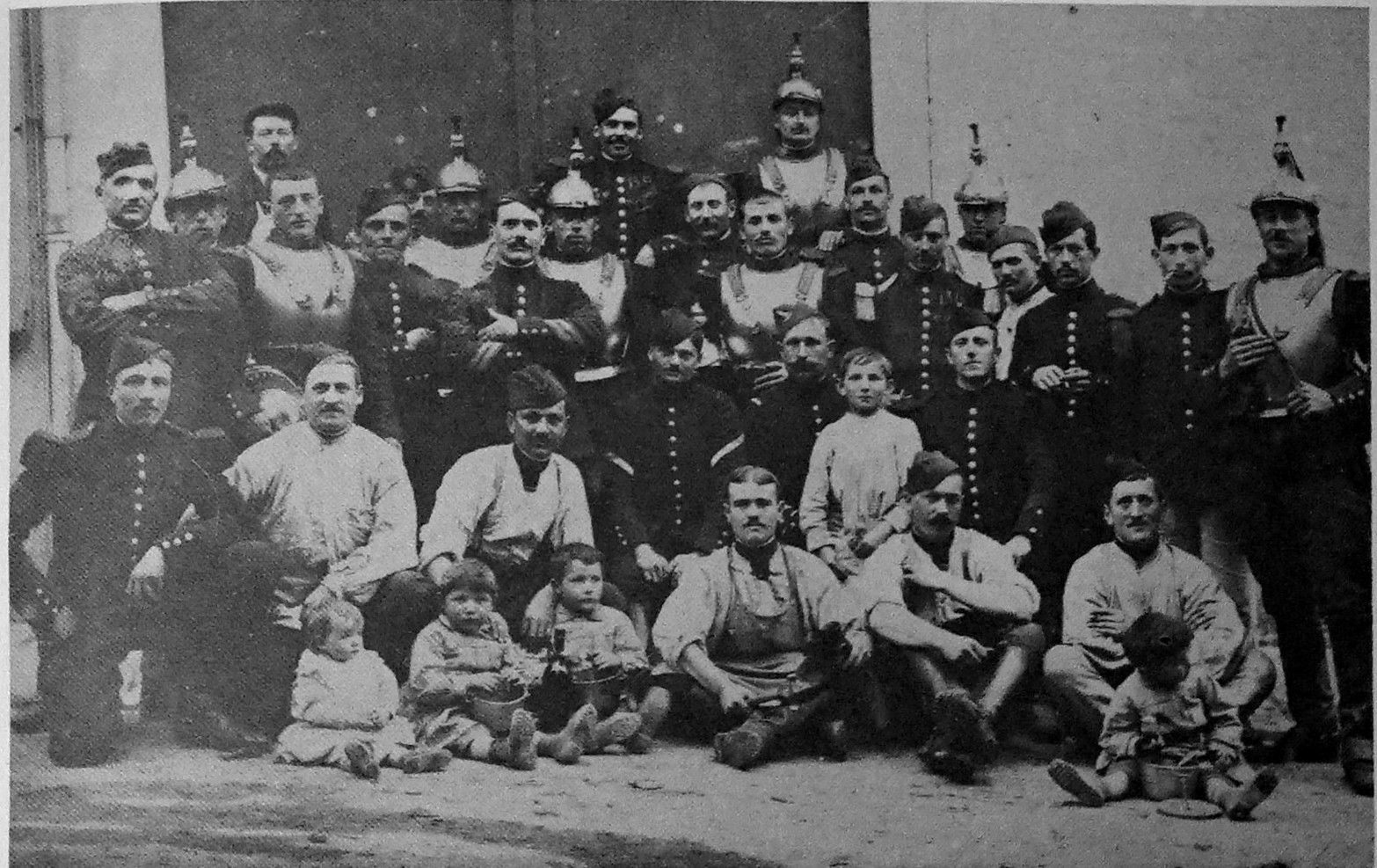 sur une vue ancienne.